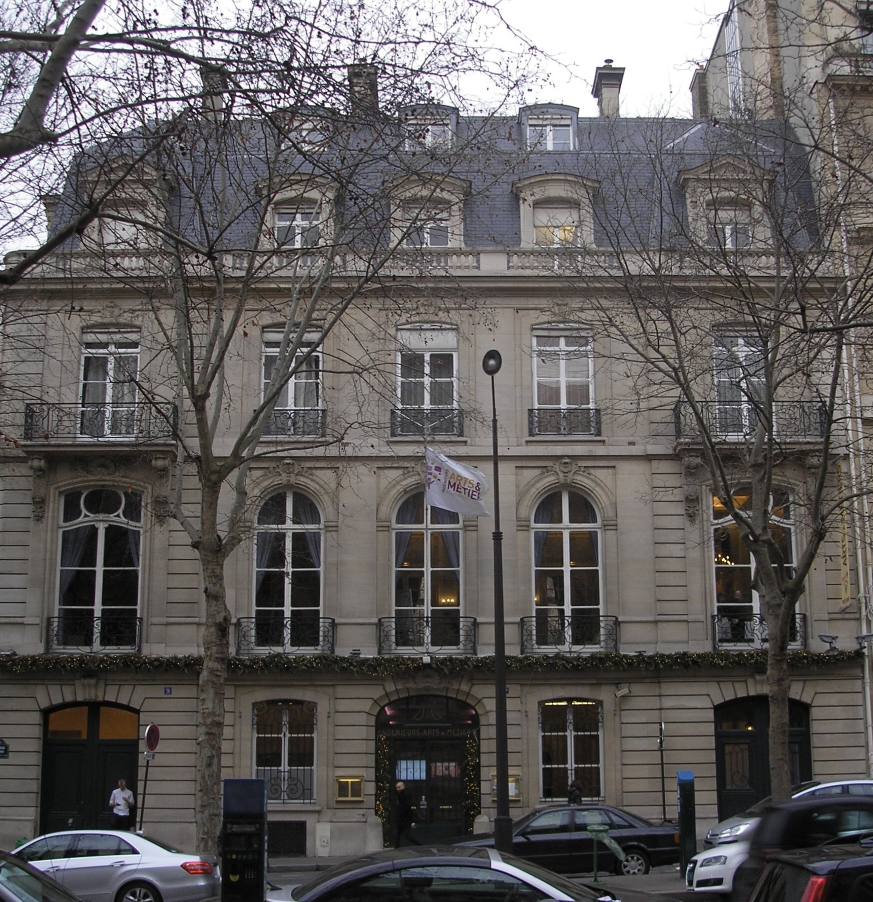 Façade de la Maison des Arts et Métiers, 9 et 9 bis avenue d'Iéna (Paris, 16e).